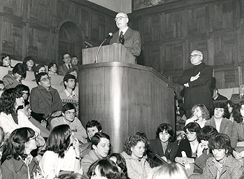 Discorso del rettore Giuseppe Lazzati nell'aula magna dell'Università Cattolica